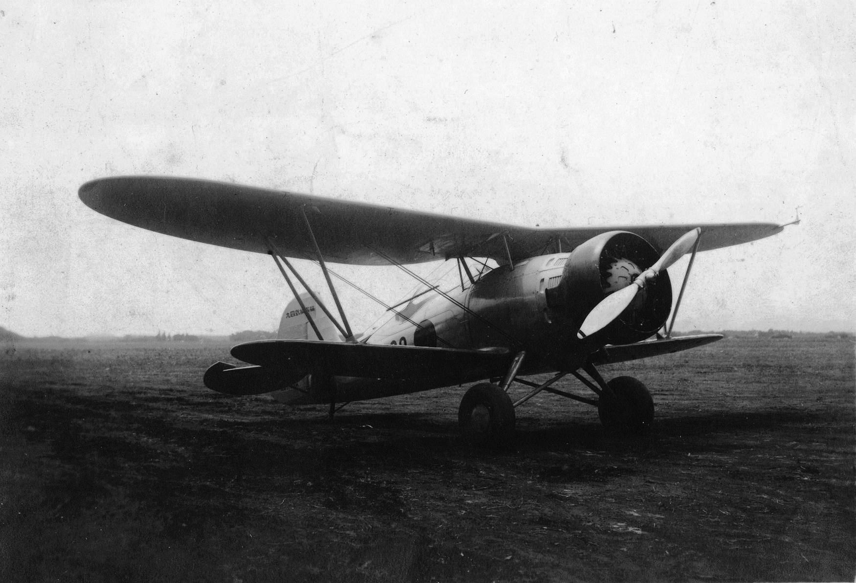 94式偵察機